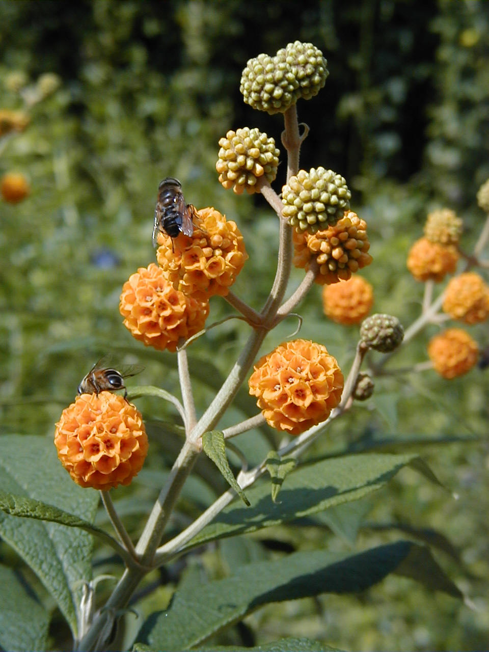 Buddleja globosa. Real Jardín Botánico de Madrid.